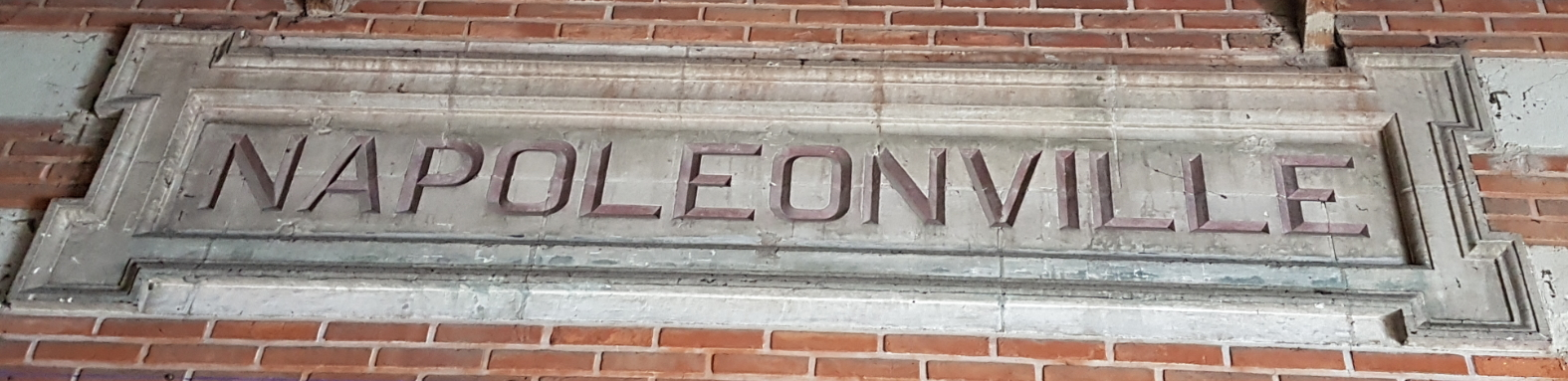 Construite sous Napoléon III, la gare porte encore sur son pignon nord, l’inscription "NAPOLEONVILLE"